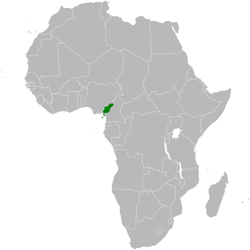 Arizelocichla tephrolaemus distribution map, based on